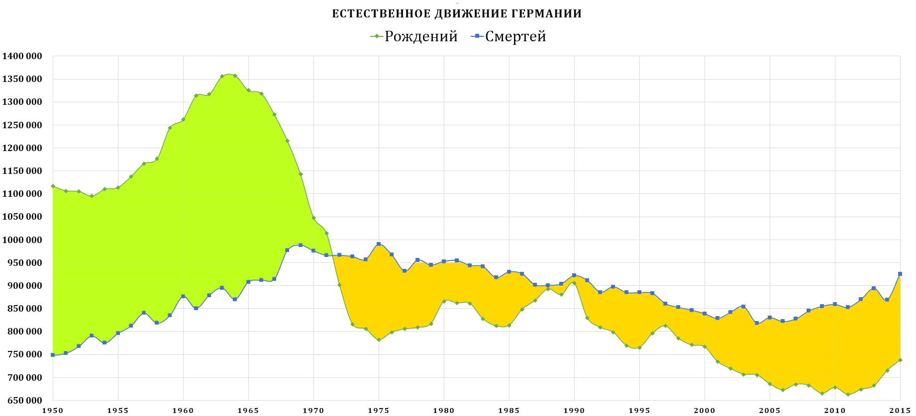 Естественное движение Германии 1950-2015